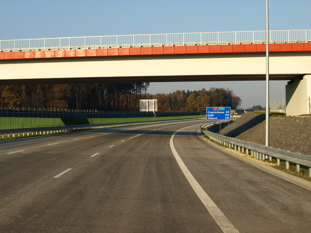 Die fertiggestellte polnische Autobahn A1 auf dem Abschnitt Maciejow-Piekary Slaskie in Richtung Pyrzowice im November 2011 vor der Eröffnung.